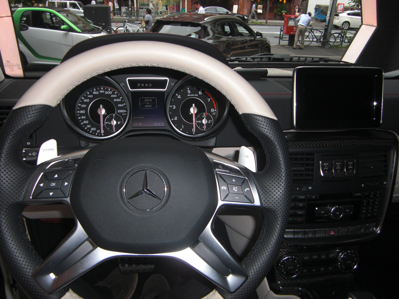 メルセデス・ベンツ Gクラス